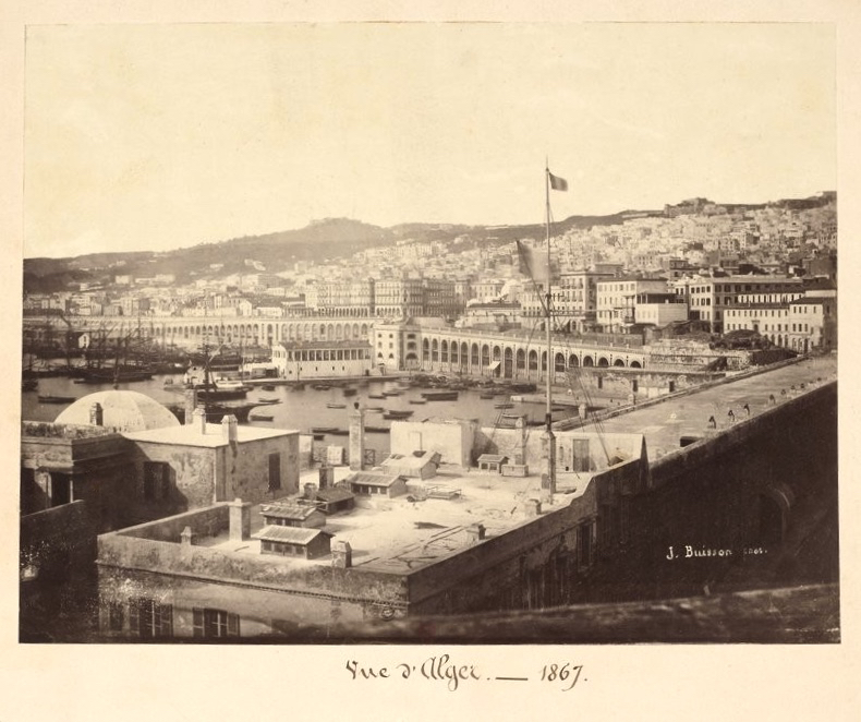 Vue d'Alger, 1867.